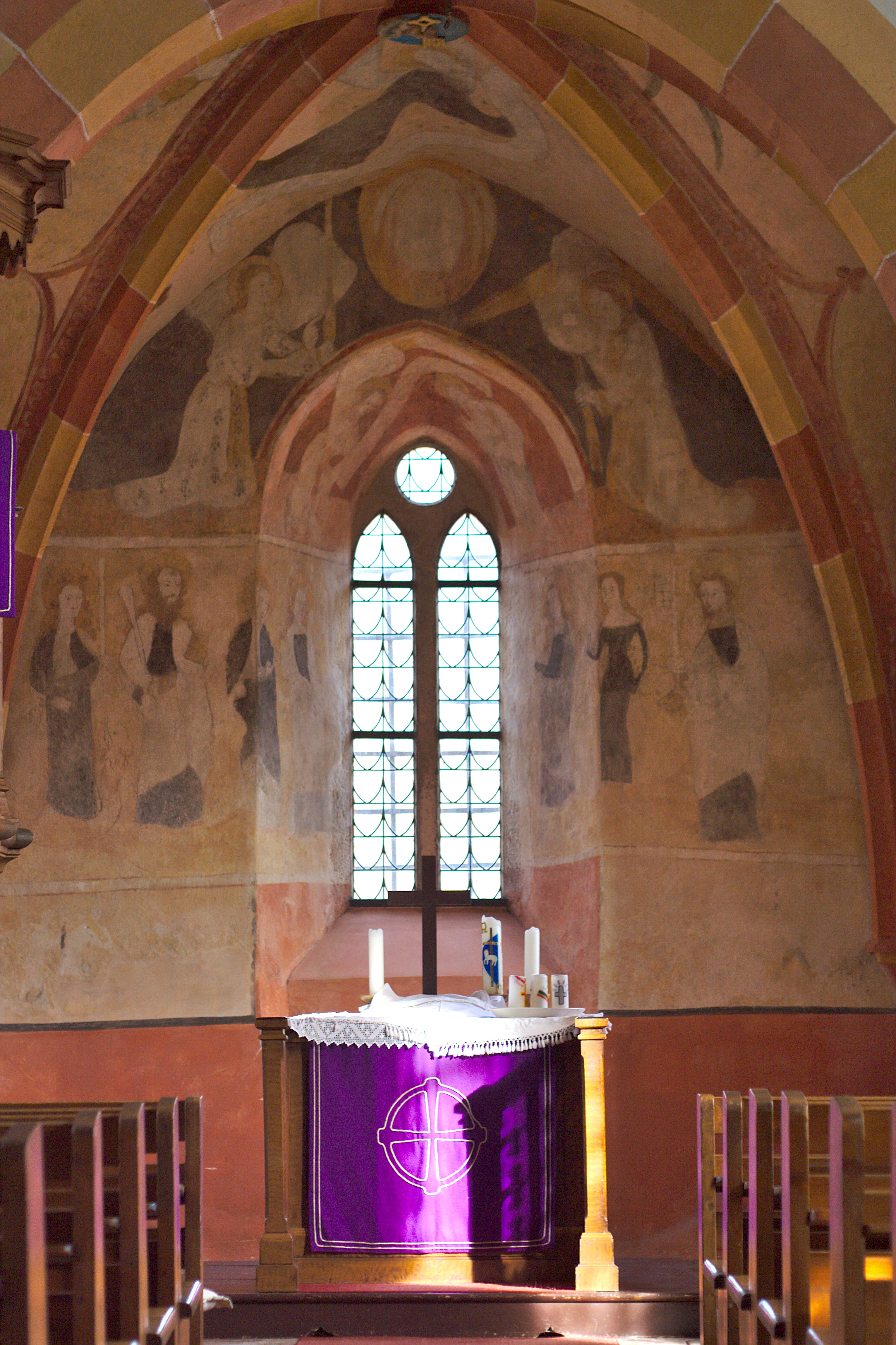 Der Altarraum der evangelischen Peterskirche in Heddesbach